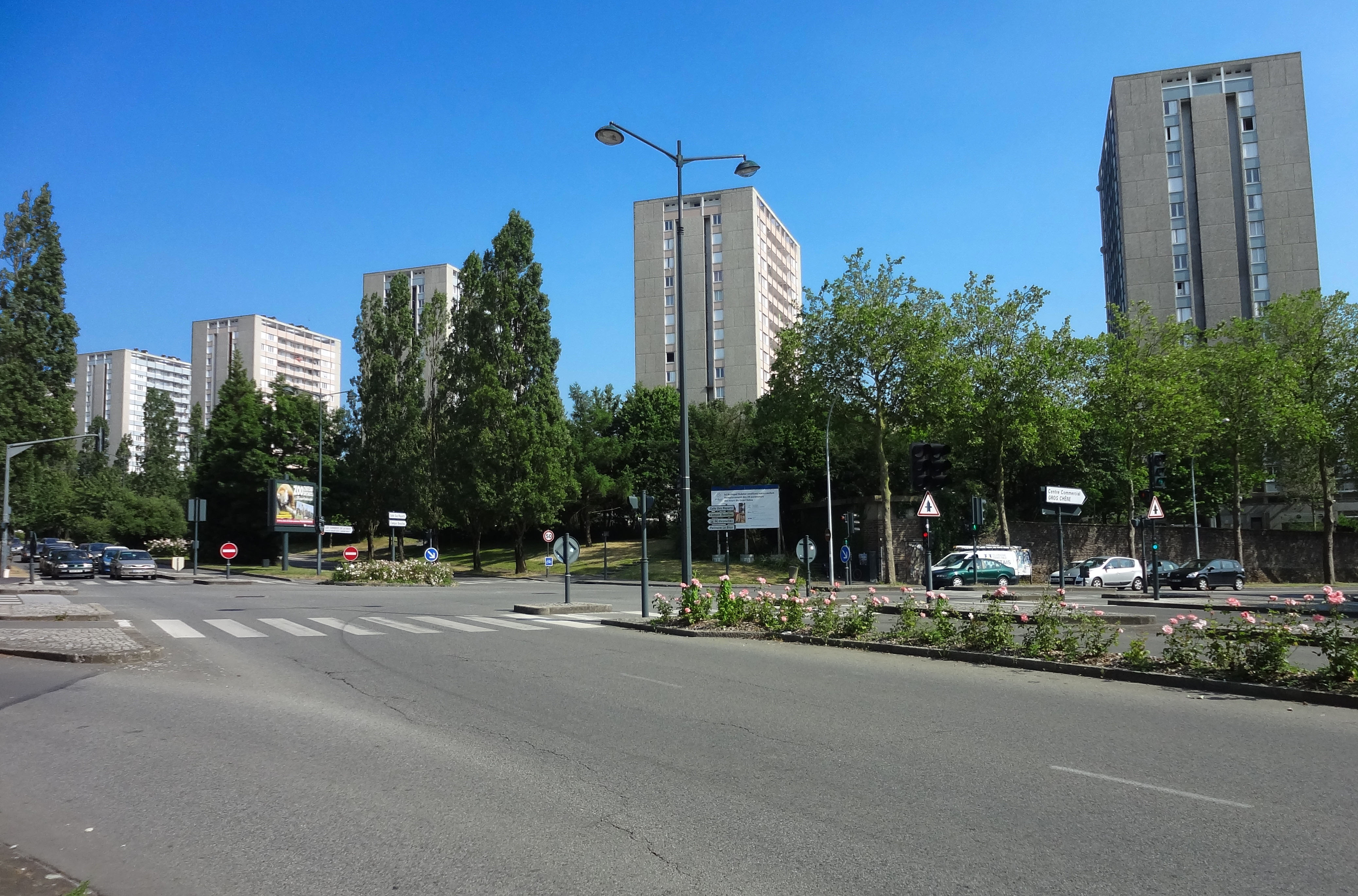 Tours du Gros-Chêne, Rennes